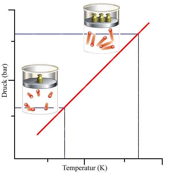 Darstellung der Veränderung des Drucks bei steigender Temperatur einer abgeschlossenen Gsamenge (Gay-Lussac)